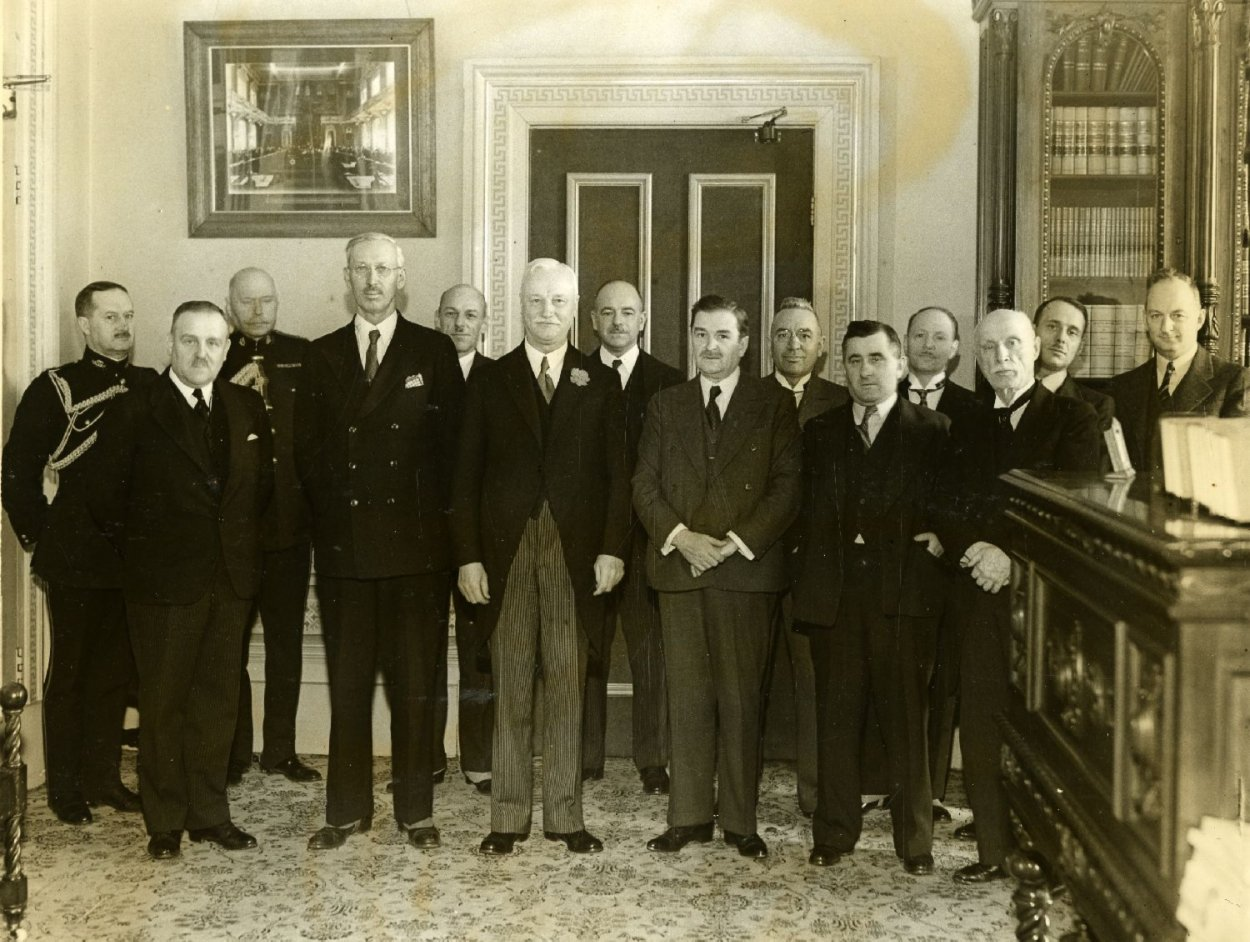 Le lieutenant-gouverneur Ésioff-Léon Patenaude et deux membres de son personnel en compagnie d'une partie des membres du premier cabinet Duplessis, 1936. De gauche à droite : Colonel Denis-Benjamin Papineau (aide de camp et chef de cabinet du lieutenant-gouverneur), Onésime Gagnon, Lieutenant-colonel Arthur Gaboury (aide de camp (?) du lieutenant-gouverneur), Martin Fisher, John Bourque, Ésioff-Léon Patenaude, Thomas Joseph Coonan, Maurice Duplessis, William Tremblay, Oscar Drouin, Dr Albiny Paquette, Sir Thomas Chapais, Joseph Bilodeau et François Leduc.